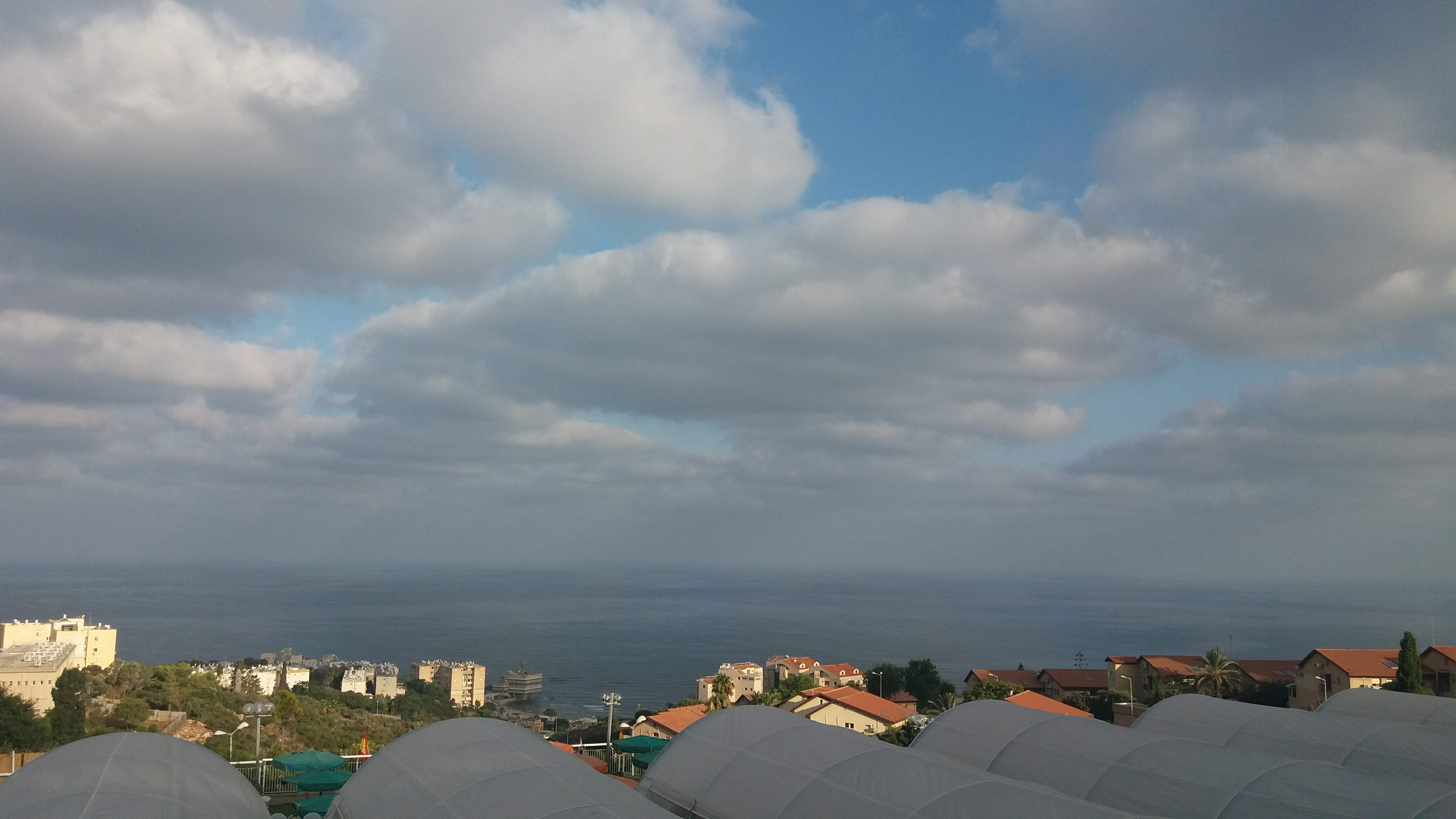 עננות בוקר קיץ 2018 עננות זו נוצרה בעת אפיק פרסי רדוד